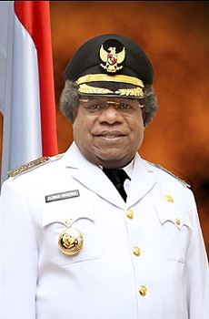 Eltinus Omalng sebagai Bupati Mimika